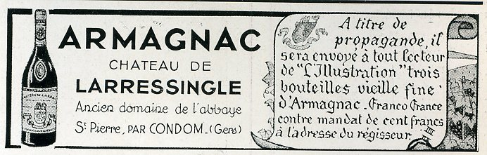 Armagnac